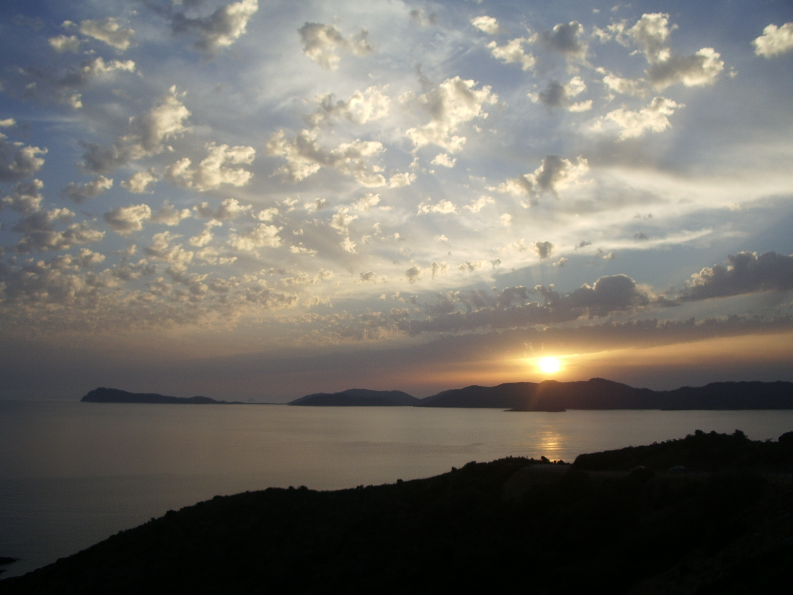 Tramonto su capo Teulada e sull' Isola Rossa visto dalla strada panoramica Teulada-Domus de Maria